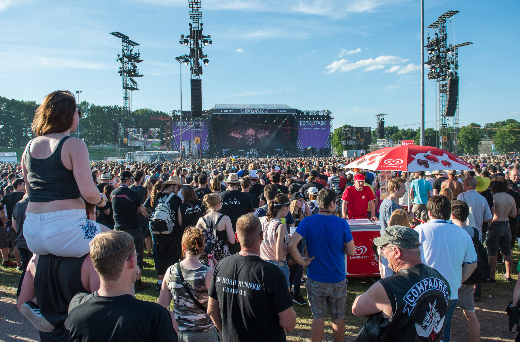 ARGO-Konzerte,Avenged Sevenfold,Centerstage,RiP,Rock im Park 2014,Spectators,Zuschauer